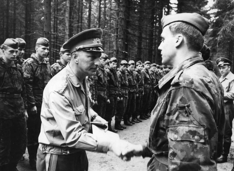 Heinz Keßler bei NVA-Truppenbesuch Zentralbild / MBD / Hoepner / 5.9.1968 / Besuch bei Truppenteilen der NVA In den ersten Tagen des Septembers besuchte der Stellvertreter des Ministers für Nationale Verteidigung und Chef des Hauptstabes, Generaloberst Heinz Keßler, Einheiten und Truppenteile der NVA, die an den gemeinsamen Handlungen der Bruderarmeen zum Schutze der sozialistischen Errungenschaften in der CSSR teilnehmen. Die Soldaten, Unteroffiziere und Offiziere versicherten Armeegeneral Heinz Hoffmann sowie den Kampfgenossen anderer Verbände und Truppenteile der NVA, daß sie den übertragenen Kampfauftrag in Ehren erfüllen werden. (Nur für Sperrarchiv) 2605/6 [MBD] Abgebildete Personen: Keßler, Heinz: Minister für Verteidigung, Armeegeneral, DDR (GND 119196719) Information added by Wikimedia users.